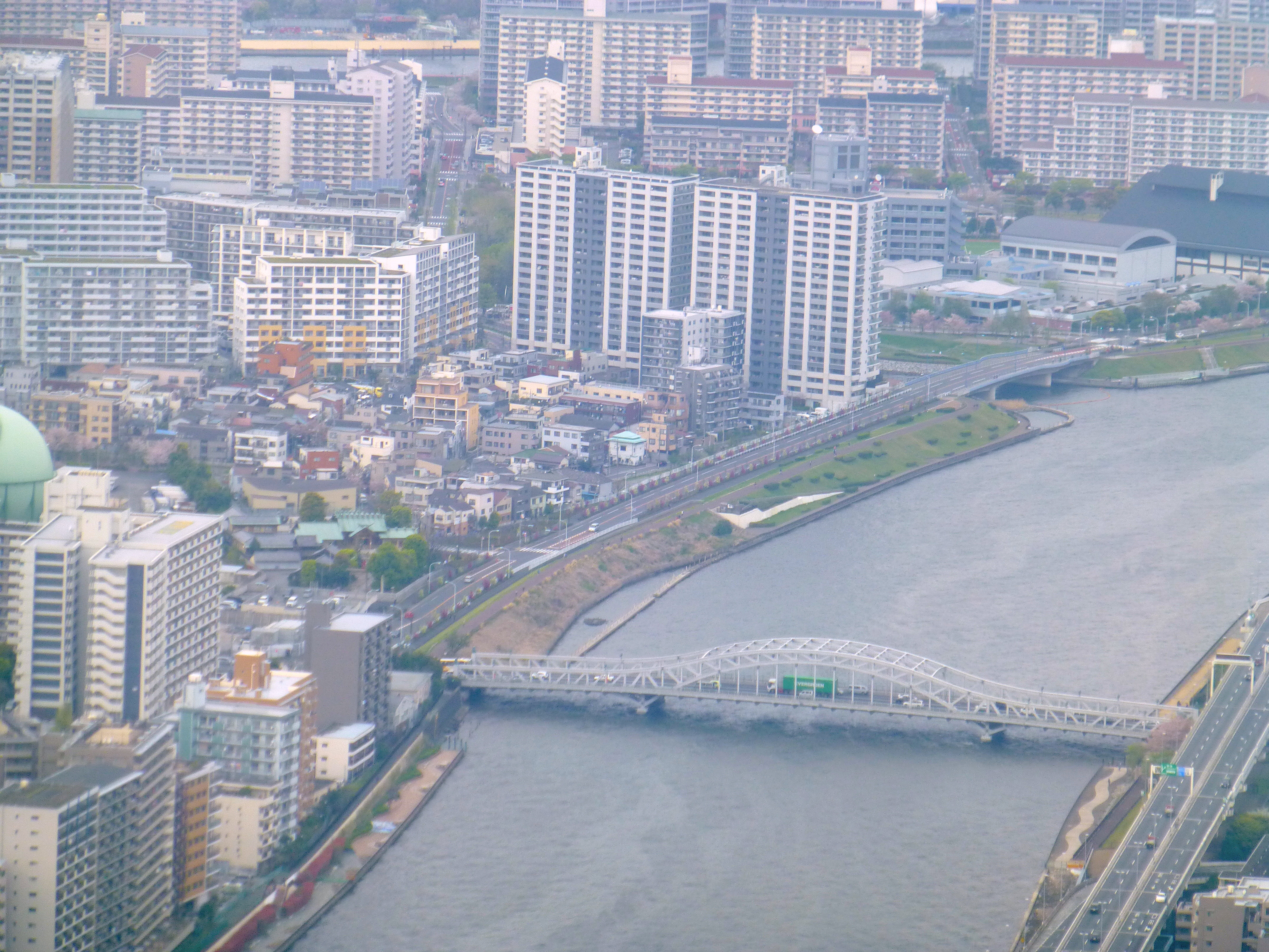 白鬚橋（しらひげばし, Shirahigebashi bridge）